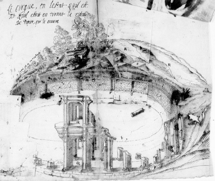 Dessin des arènes de Béziers (vers 1628)